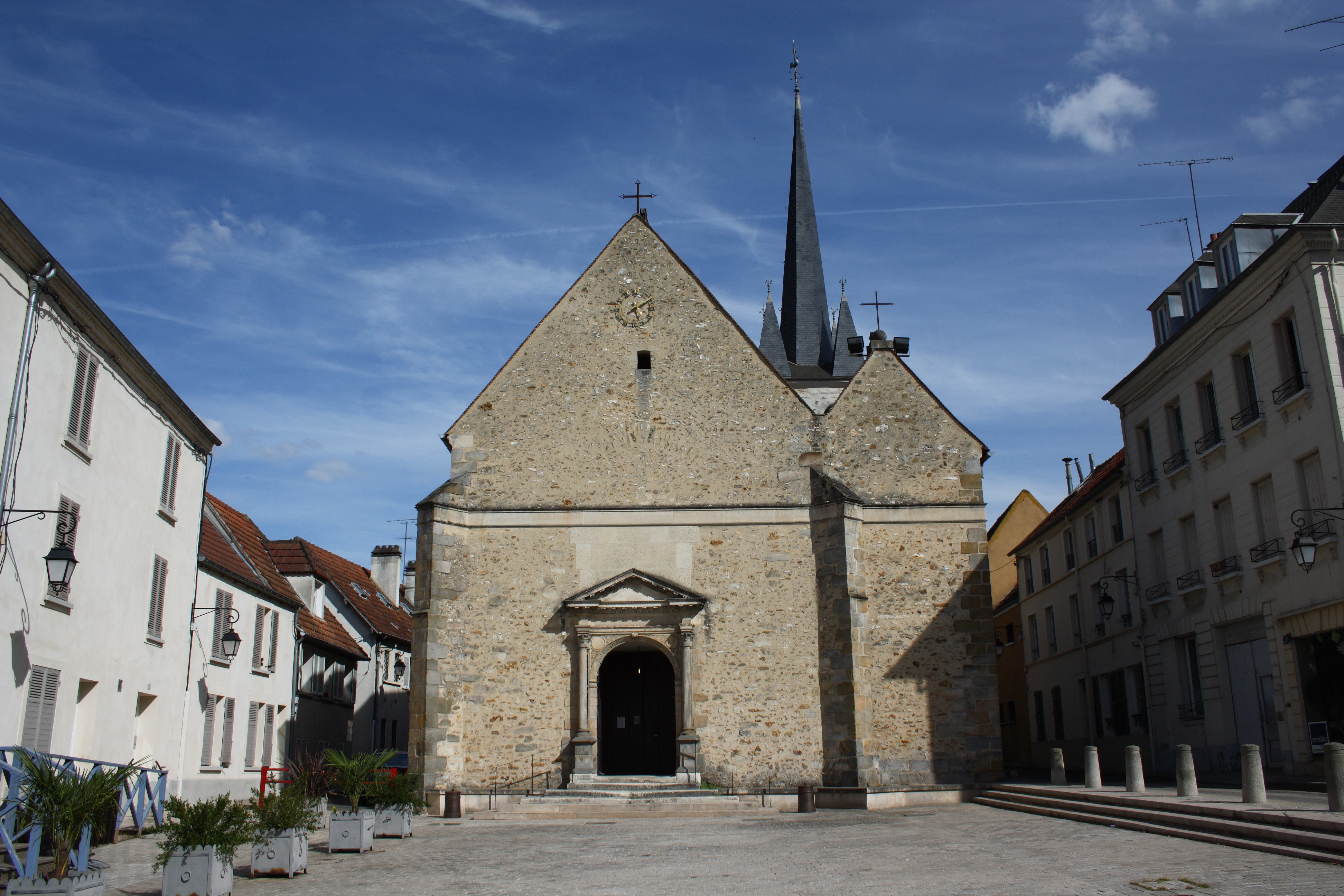 Katholische Pfarrkirche Saint-Martin in Jouy-en-Josas im Département Yvelines in der Region Île-de-France (Frankreich)